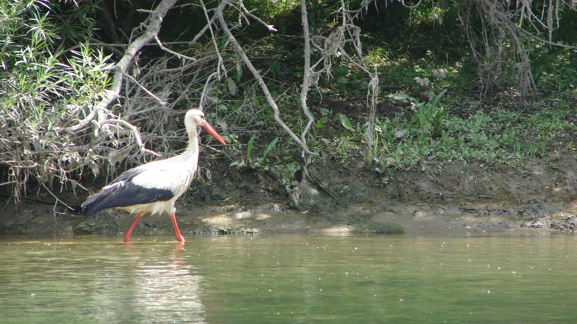 Регіональний ландшафтний парк «Дністер», Могилів-Подільський, Ямпільський р-н.